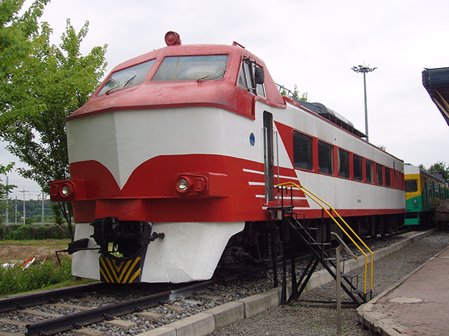 철도박물관에 전시중인 우등형 전기 동차